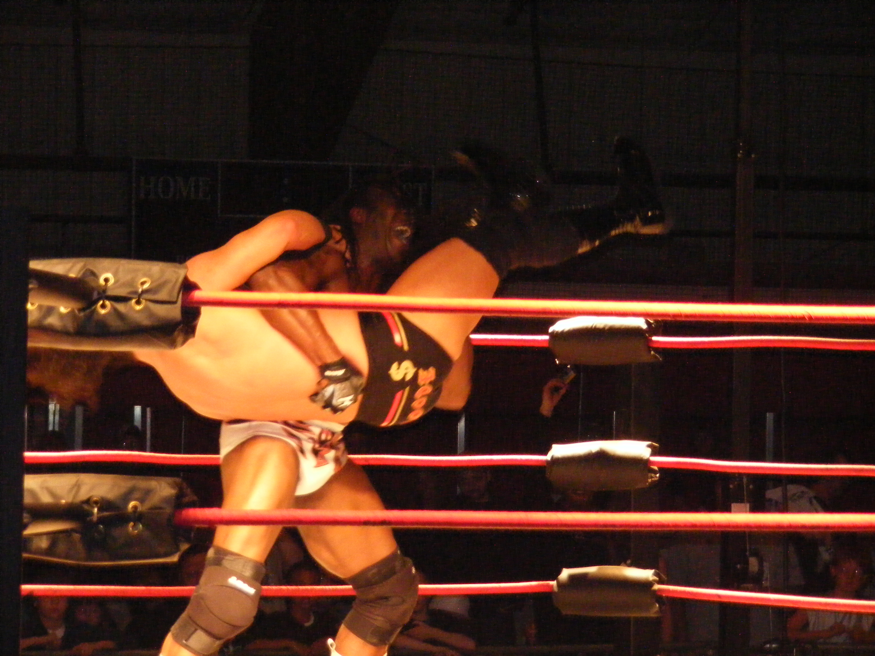 Booker peleando ante Robert Rood en la TNA.